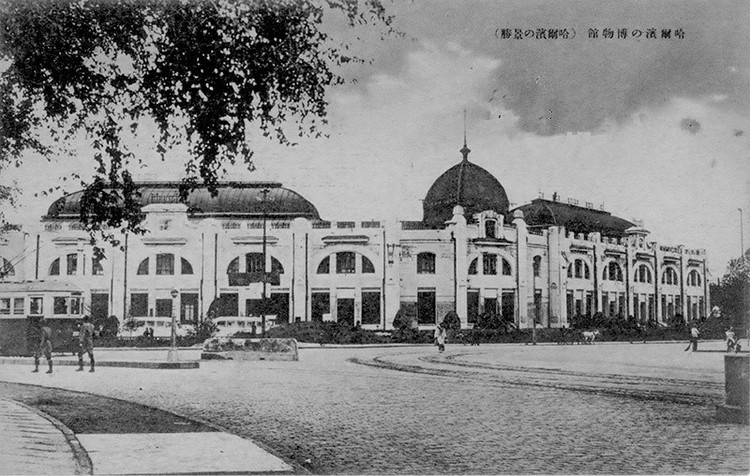 哈尔滨黑龙江省博物馆旧照